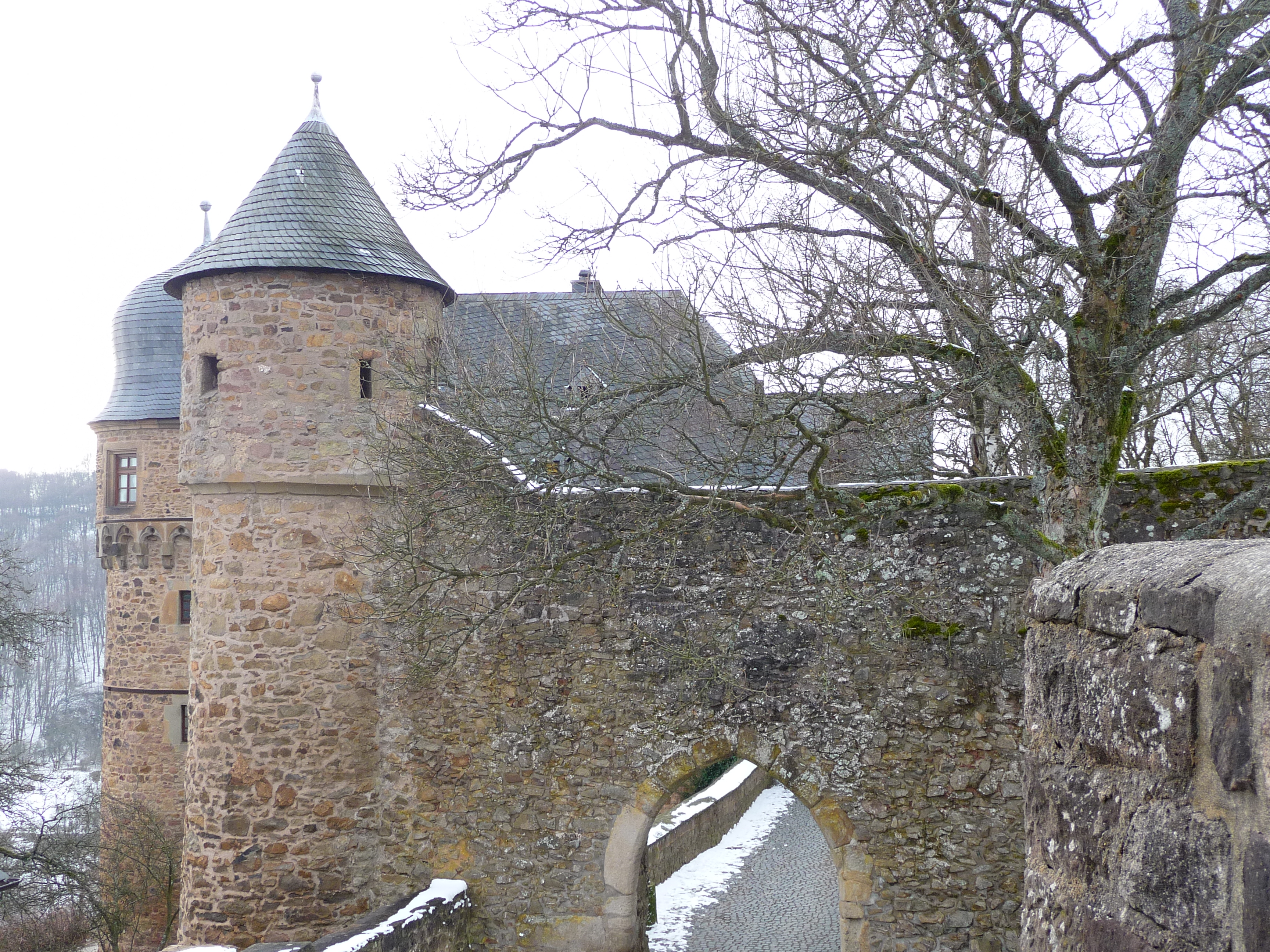 Burg Lichtenberg: Blick auf das dritte Tor und die Landschreiberei (Landkreis Kusel, Rheinland-Pfalz, Deutschland)